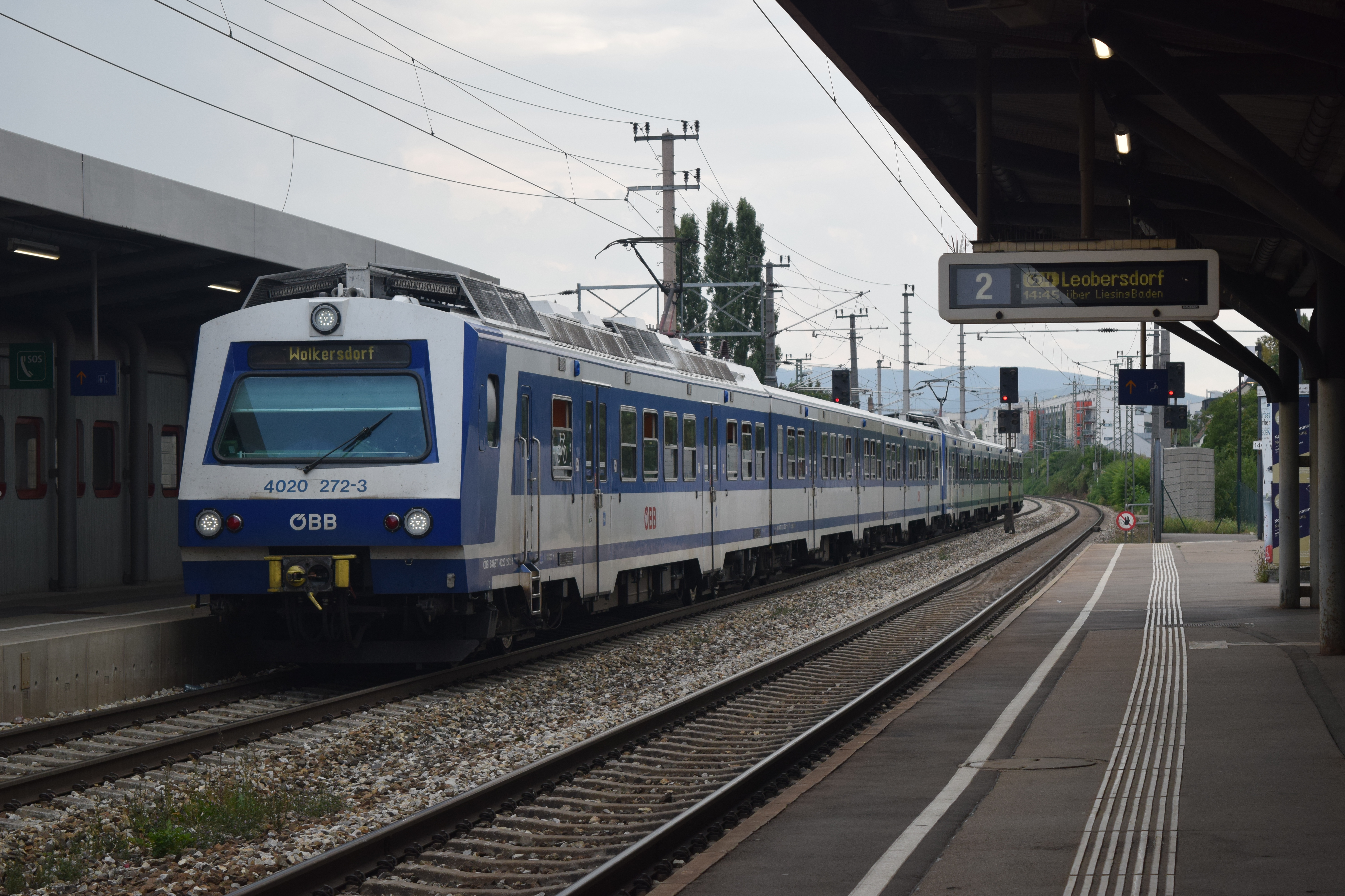 4020.272 in Atzgersdorf.